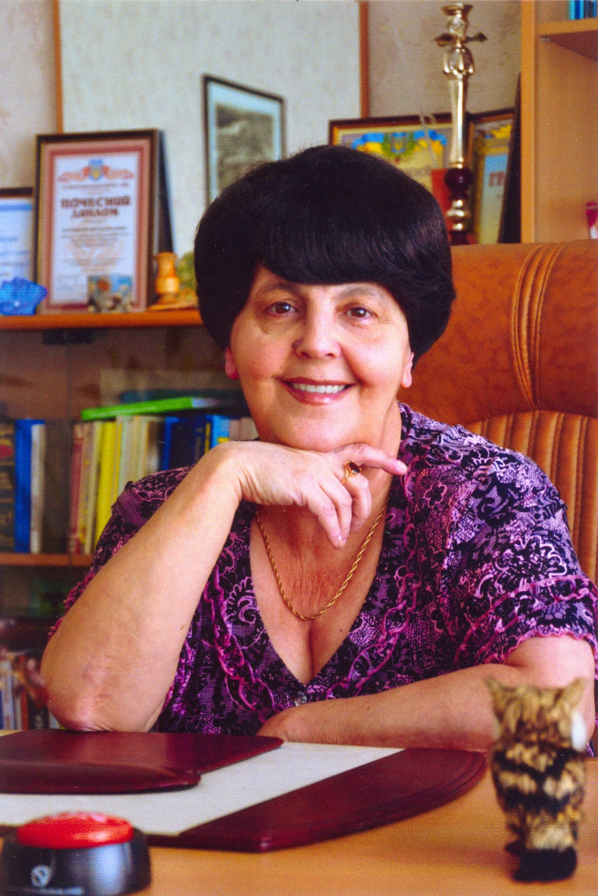 Суханцева, В.К